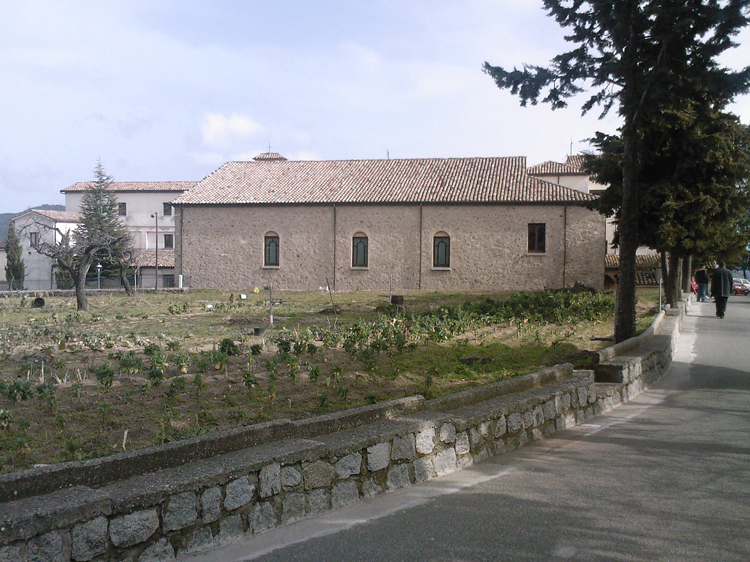 San Giovanni in Fiore - Convento padri Cappuccini - Giardino del convento e viale centrale